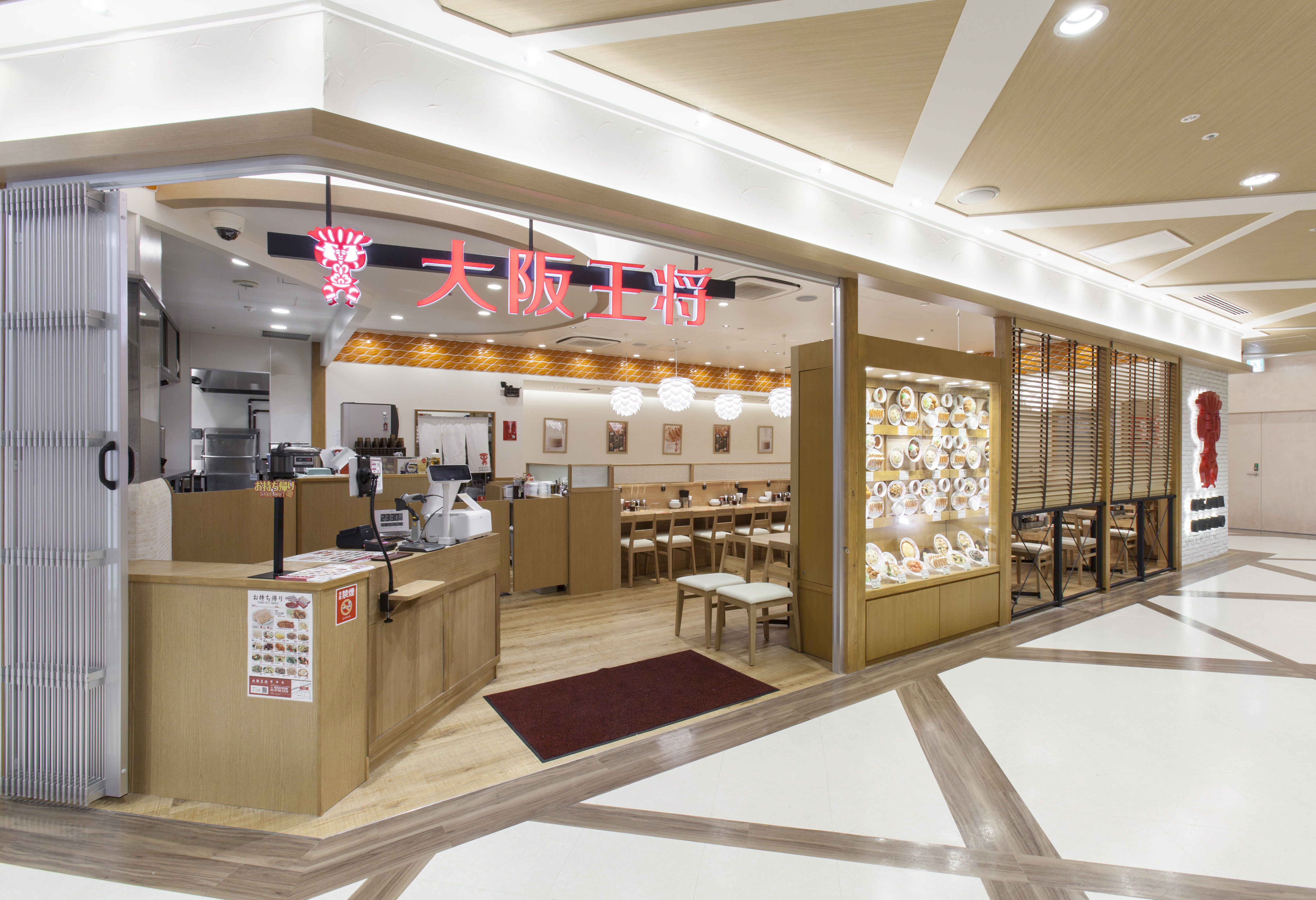 東京都渋谷区（笹塚駅前商業施設「フレンテ笹塚」3F）